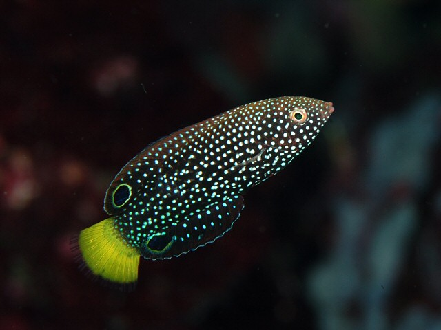 ホクトベラ Anampses meleagrides